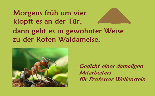 Gedicht über Wellensteins Studium der Roten Waldameise